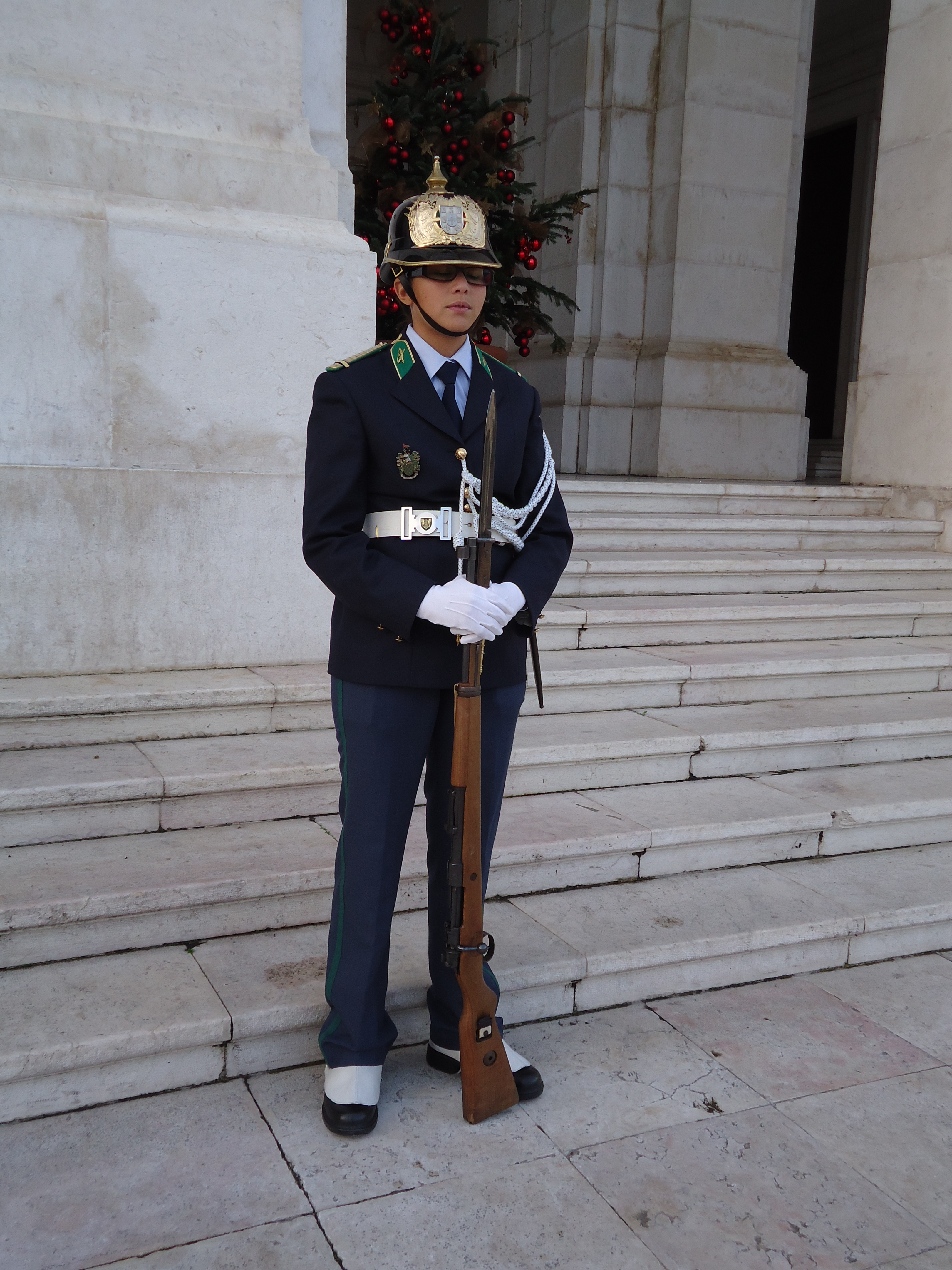 Palácio de São Bento (Assembleia da República), Lisboa, Portugal: guarda de honra.